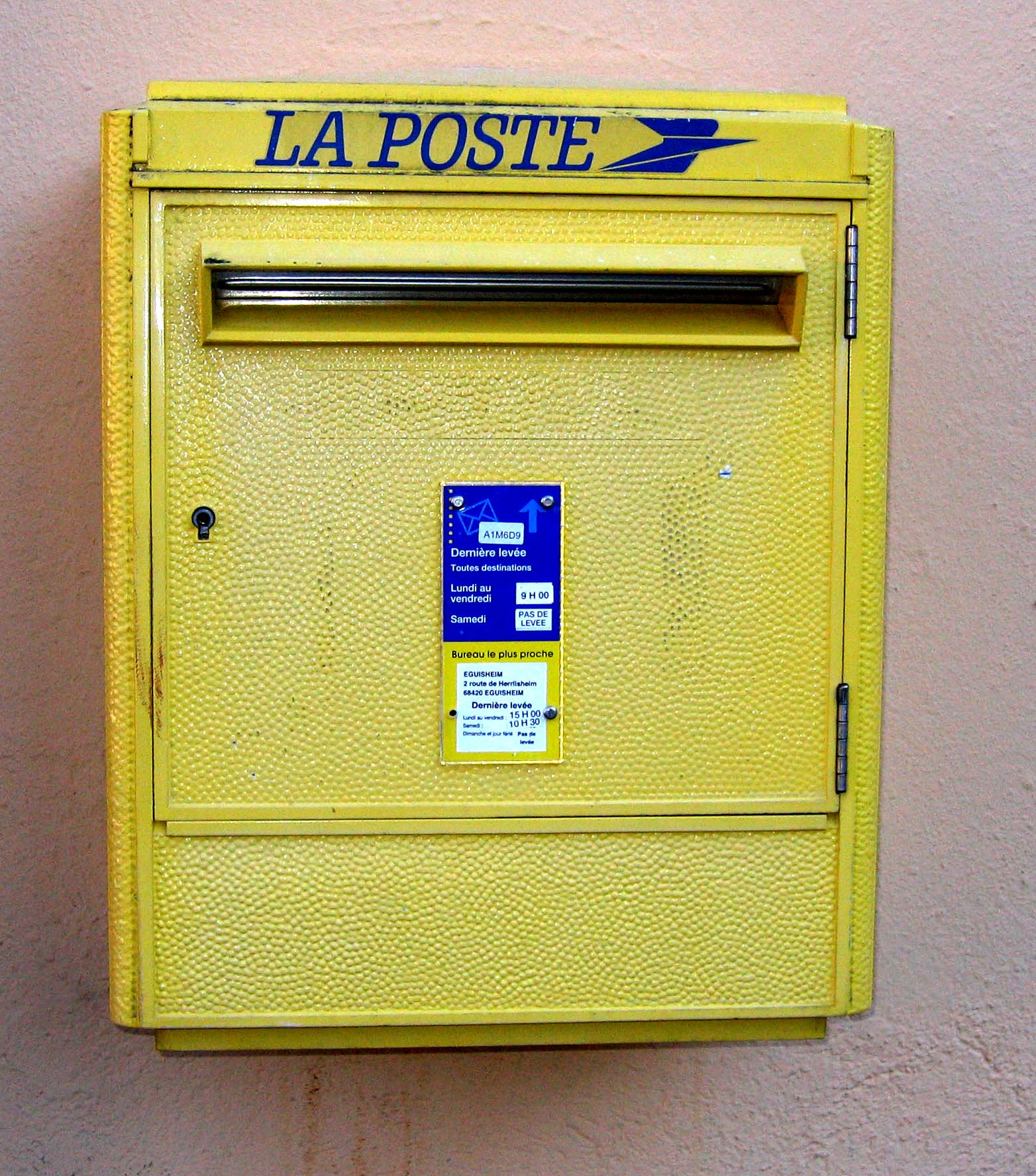 boîte aux lettres des années 1980-90